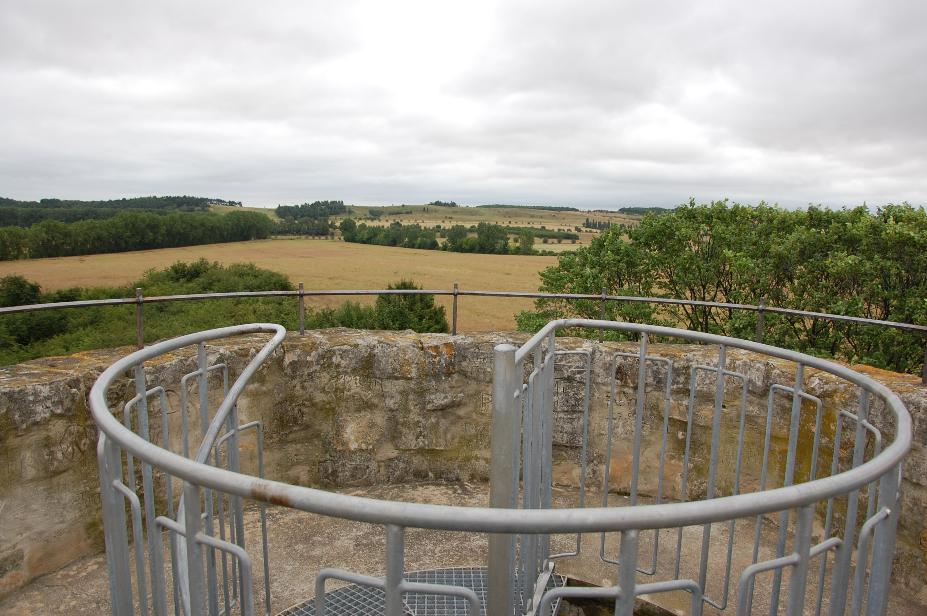 Bicklingswarte oben